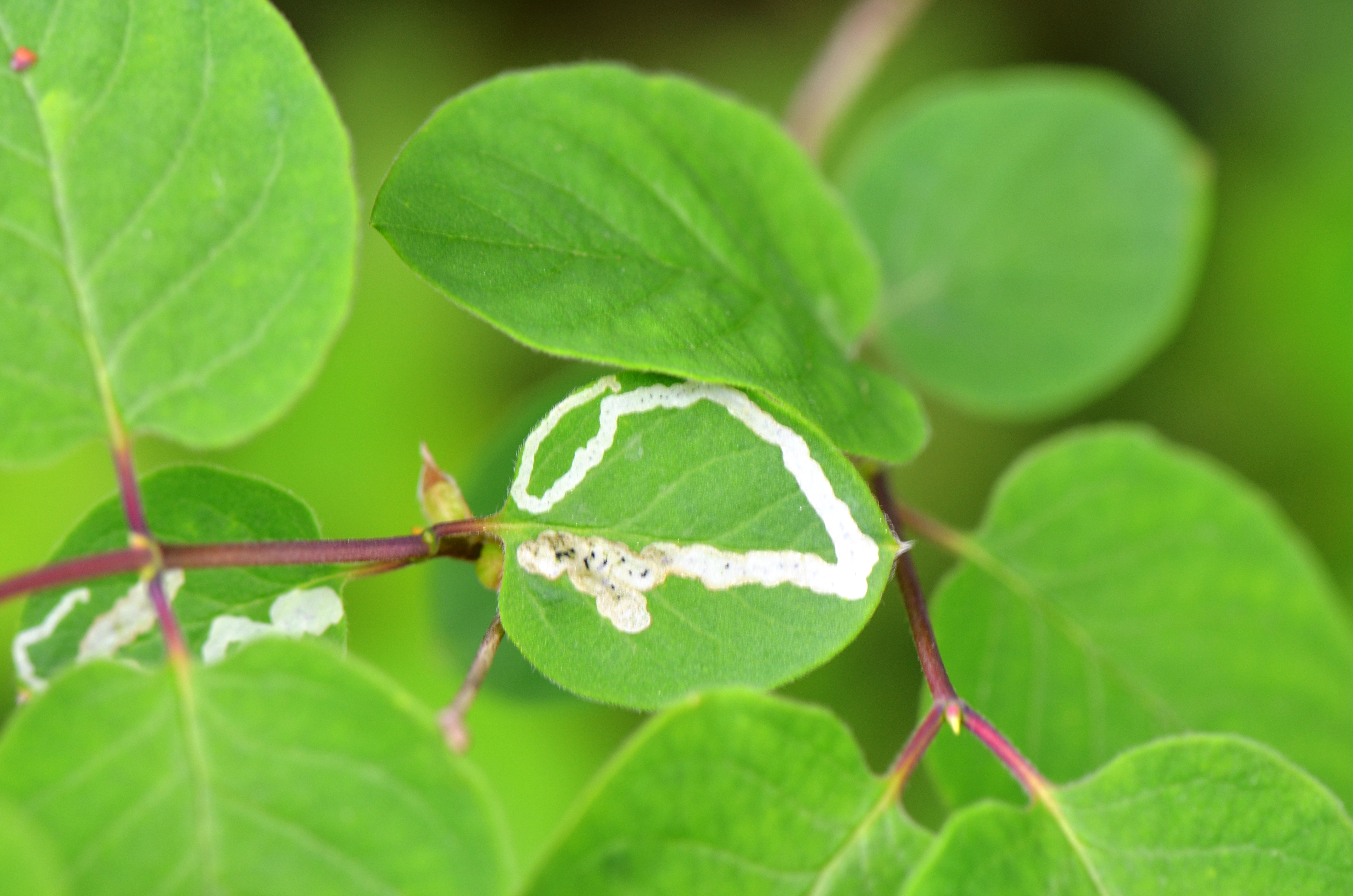 Chromatomyia lonicerae sur Camerisier à balais